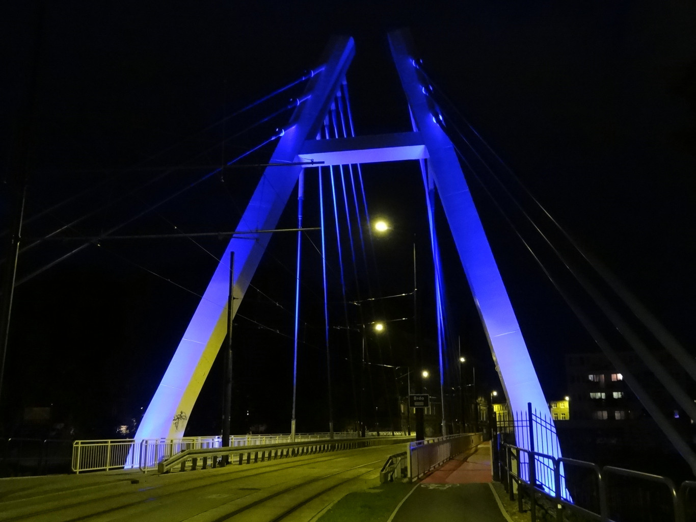 Most tramwajowy im. Władysława Jagiełły nad Brdą w Bydgoszczy